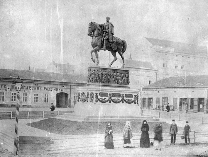 Споменик Кнезу Михаилу.